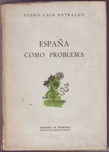 Cubierta España como problema 1ª ed. 1949